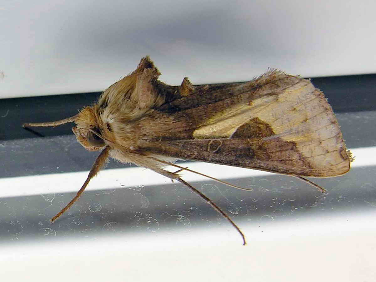 Foto tirada cunha Nikon E8800 Boiro - Galicia - Spain